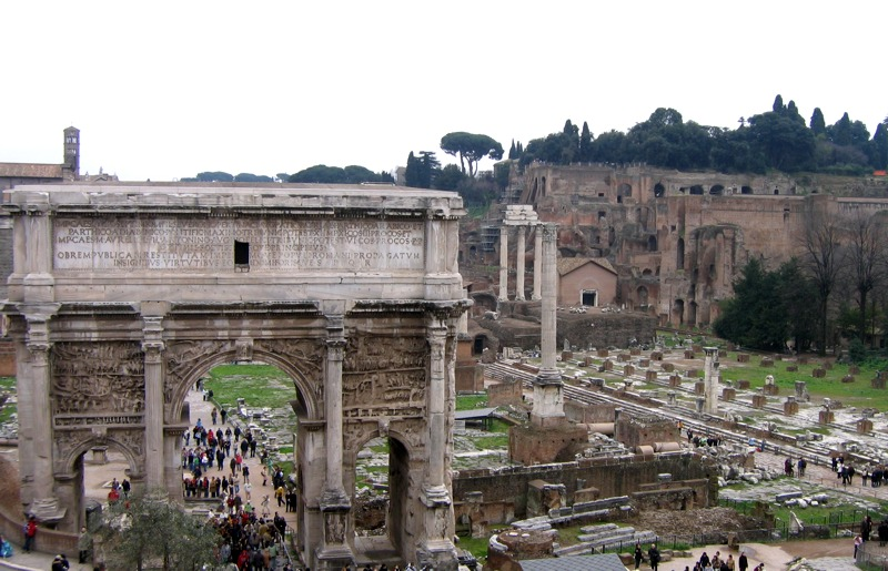 Autoriaus nuotrauka, 2006.03.19. Roma. Palatino kalva nuo kurios prasidėjo Roma. Ji buvo aristokratų ir valdovų rajonu. Prieš kalvą - Romos forumas. Nuotrauka gali būti platinama pagal GFDL licenciją.